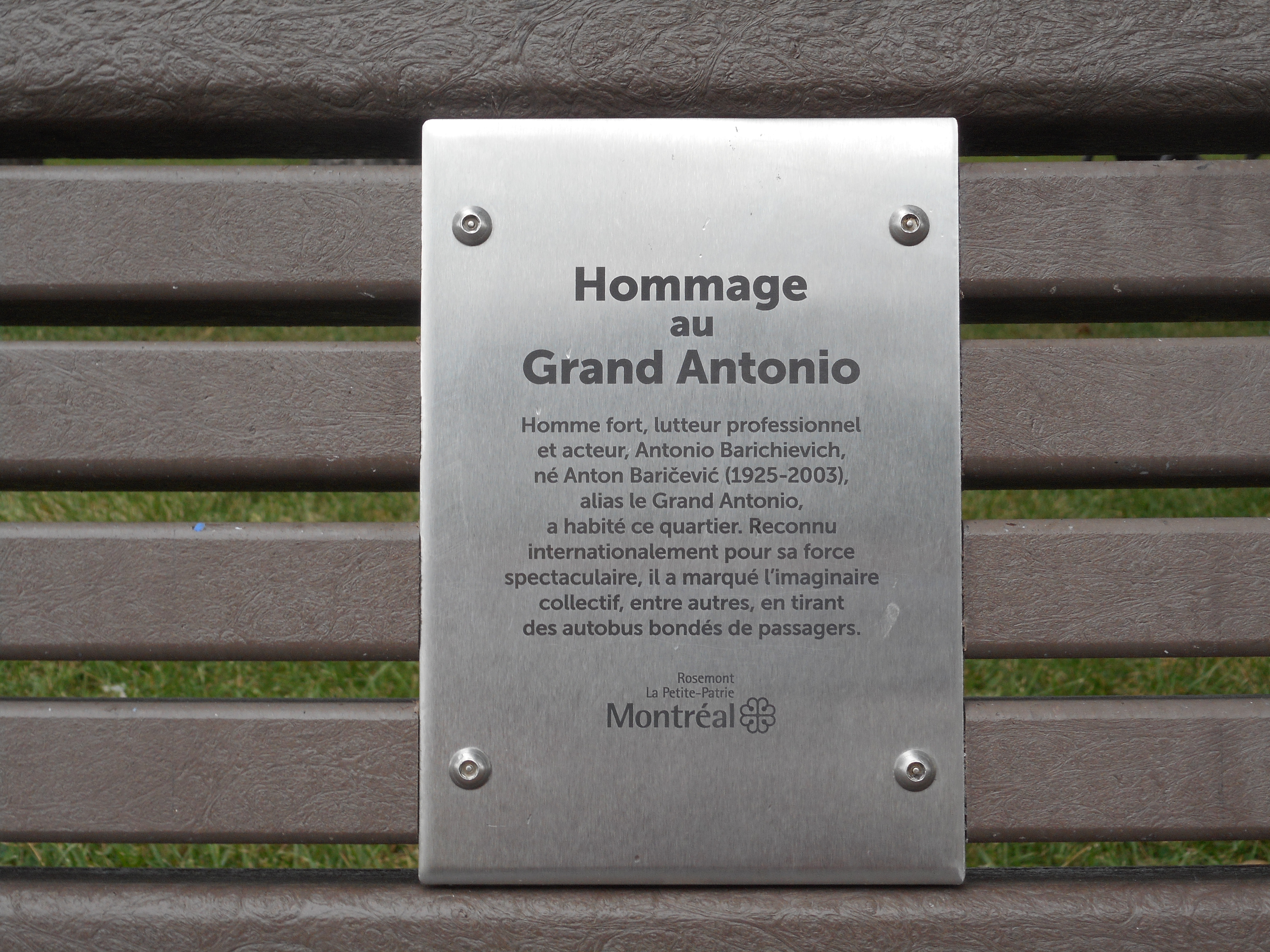 Le parc Beaubien est un parc de Montréal situé dans l'arrondissement Rosemont–La Petite-Patrie, au nord de la rue Beaubien, entre les 6e et 9e avenues, et au sud de la rue Saint-Zotique. Antonio Barichievich avait l'habitude de venir se reposer sur un banc du parc. En son hommage, une plaque est apposée, le 9 septembre 2015, sur un banc du parc Beaubien.